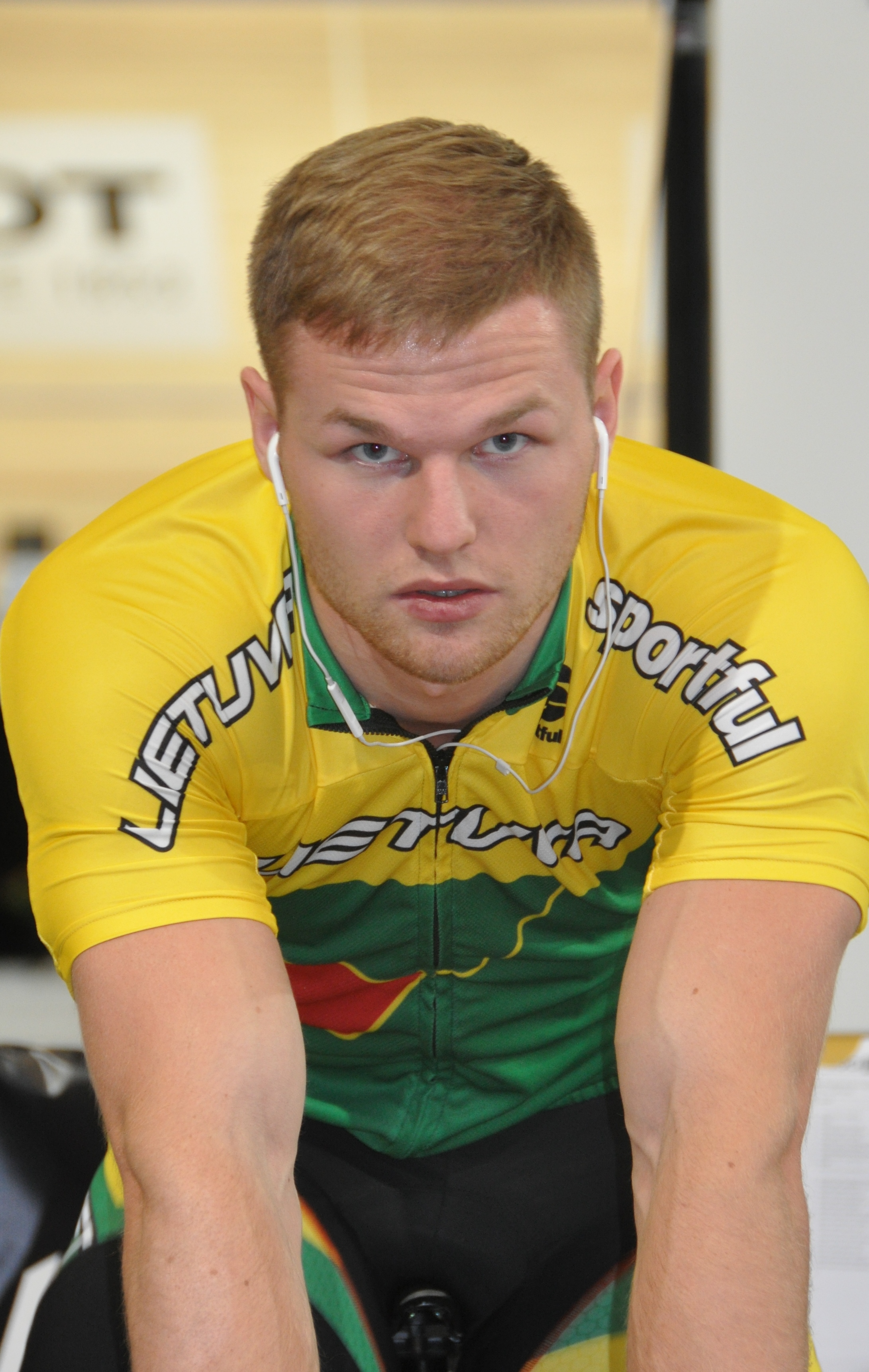 Vasilijus Lendel, litauischer Radsportler